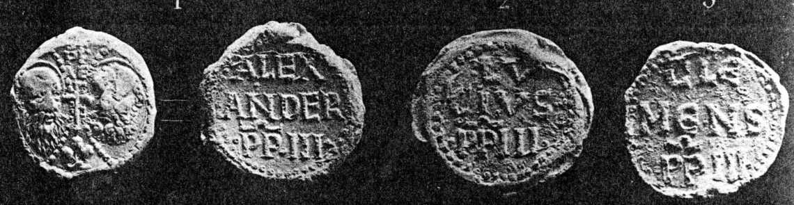 Papstbullen des 12. Jahrhunderts: Alexander III., Lucius III., Clemens III. Papal Seals XII century Bolle pontificie secolo XII: Alessandro III, Lucio III, Clemente III